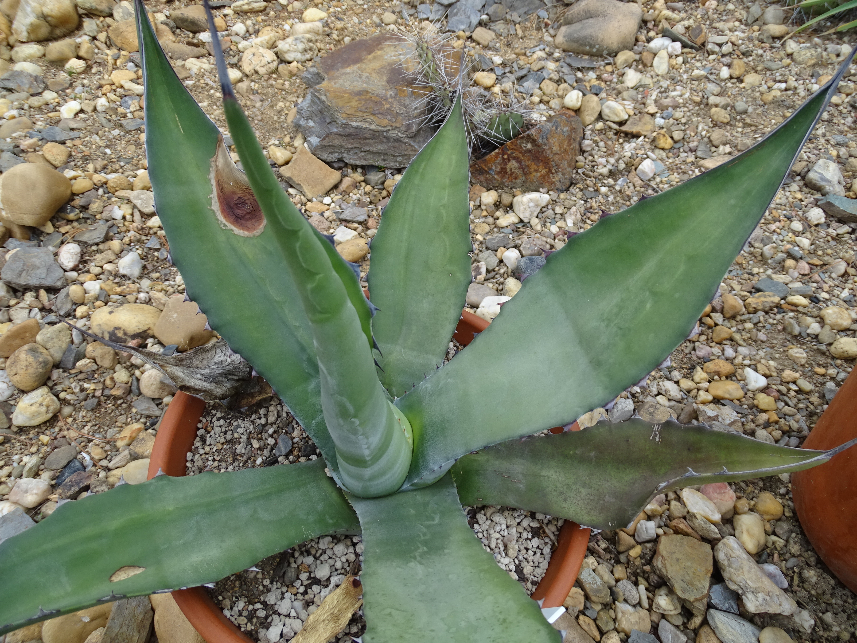 Botanická zahrada Praha